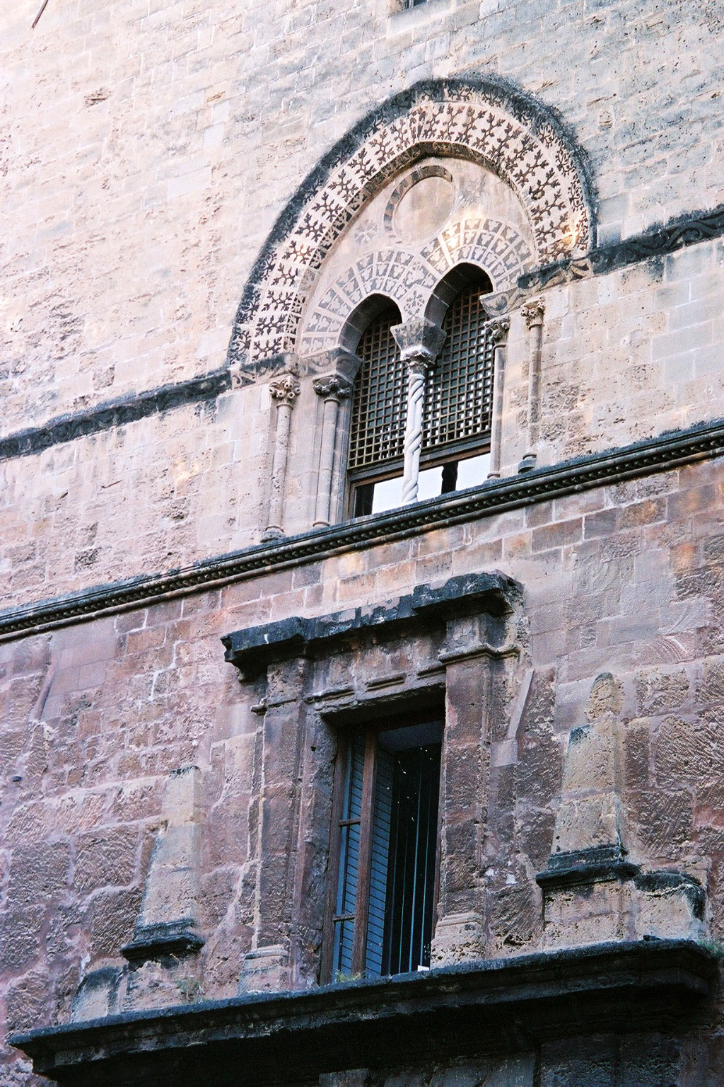 Palazzo Chiaramonte, Palermo Facade detail